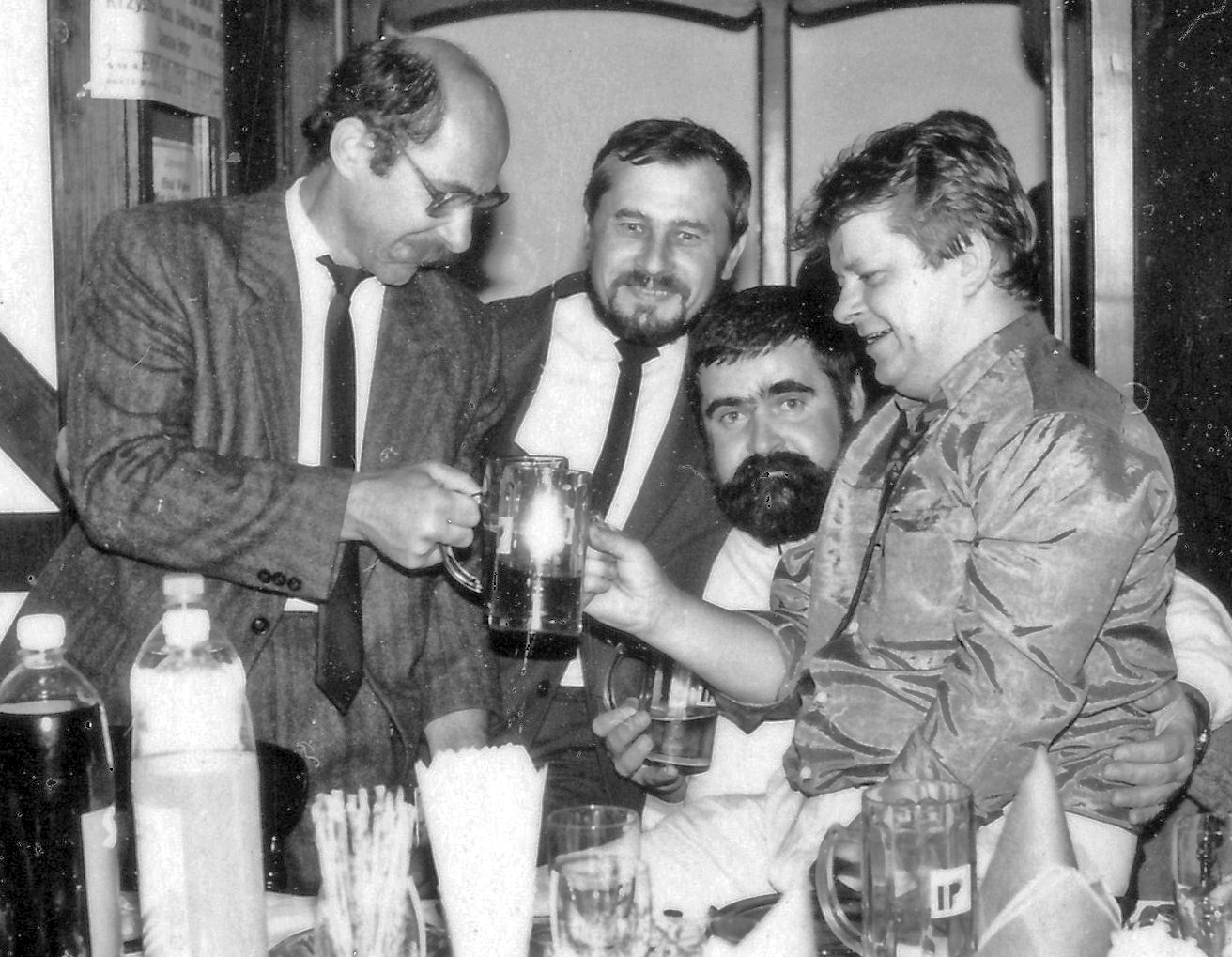 Leszek Bubel (pierwszy z prawej) i Janusz Rewiński (drugi z prawej) podczas spotkania członków PPPP (Polskiej Partii Przyjaciół Piwa).